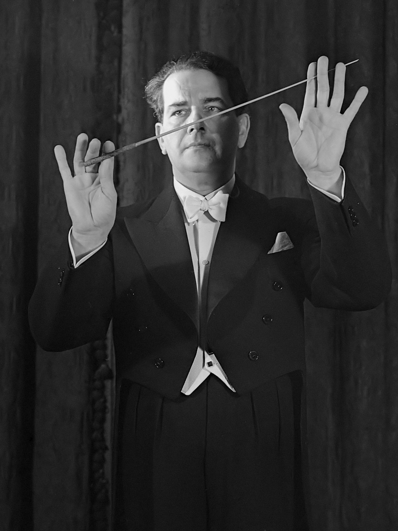 Eduard van Beinum 6 februari 1946